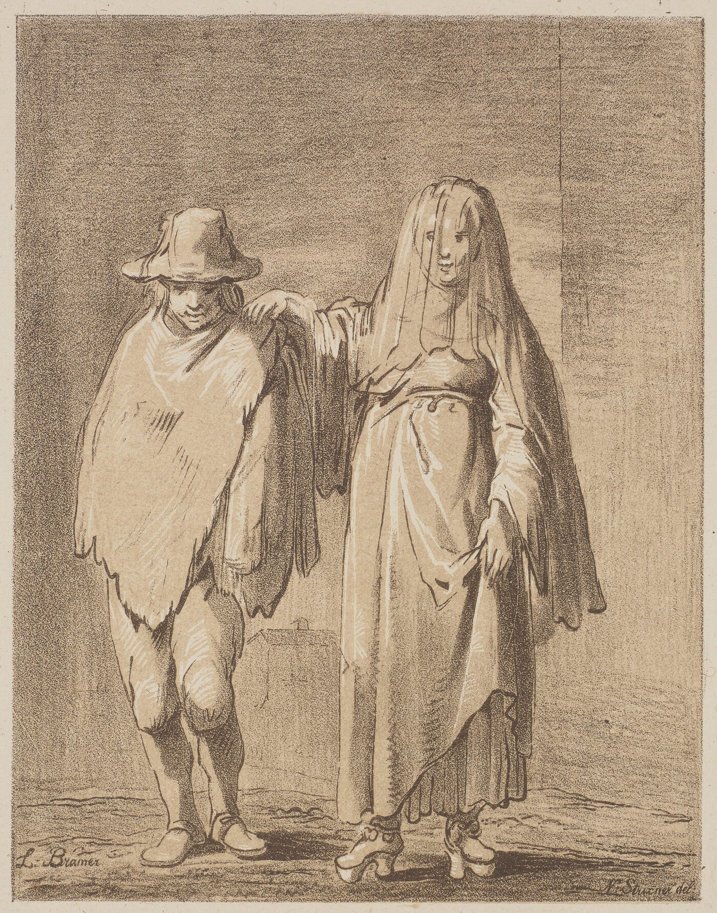 [Młoda para wieśniaków] Johann Nepomuk Strixner